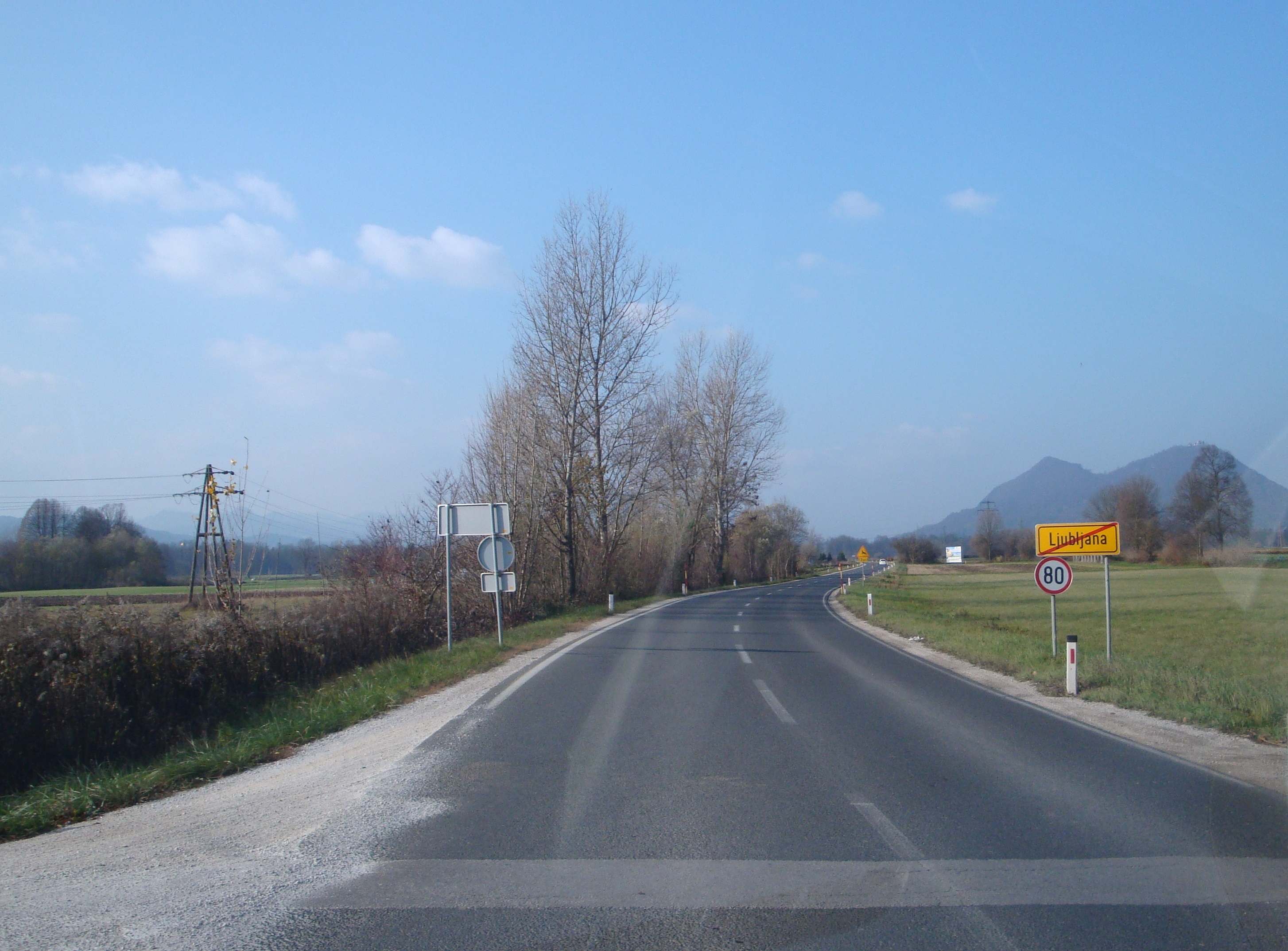 Obvozna cesta, Ljubljana, Slovenija; pogled proti Šmarni gori